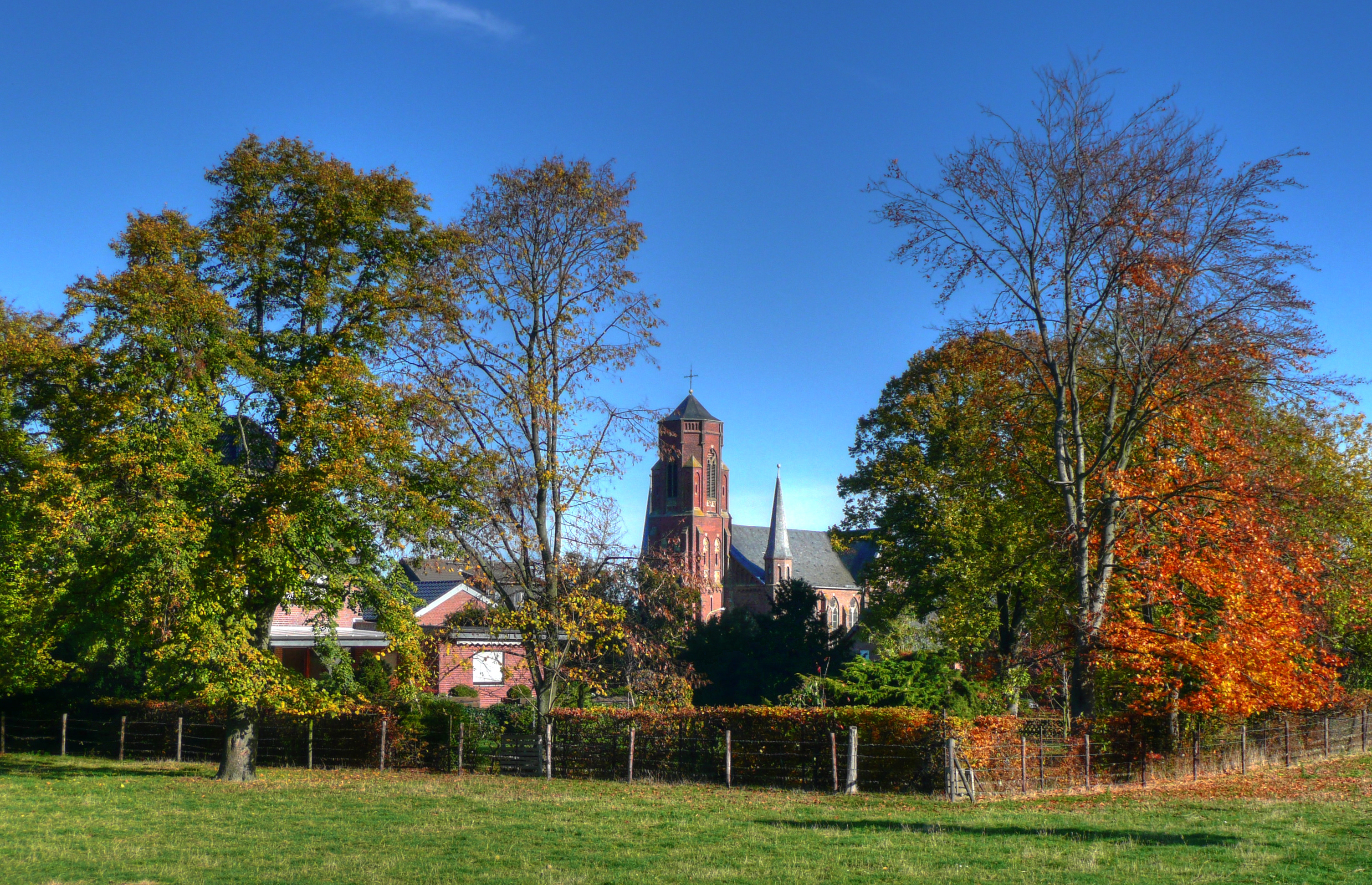 Wenauer Hof und Pfarrkirche St. Gregorius in Golzheimer